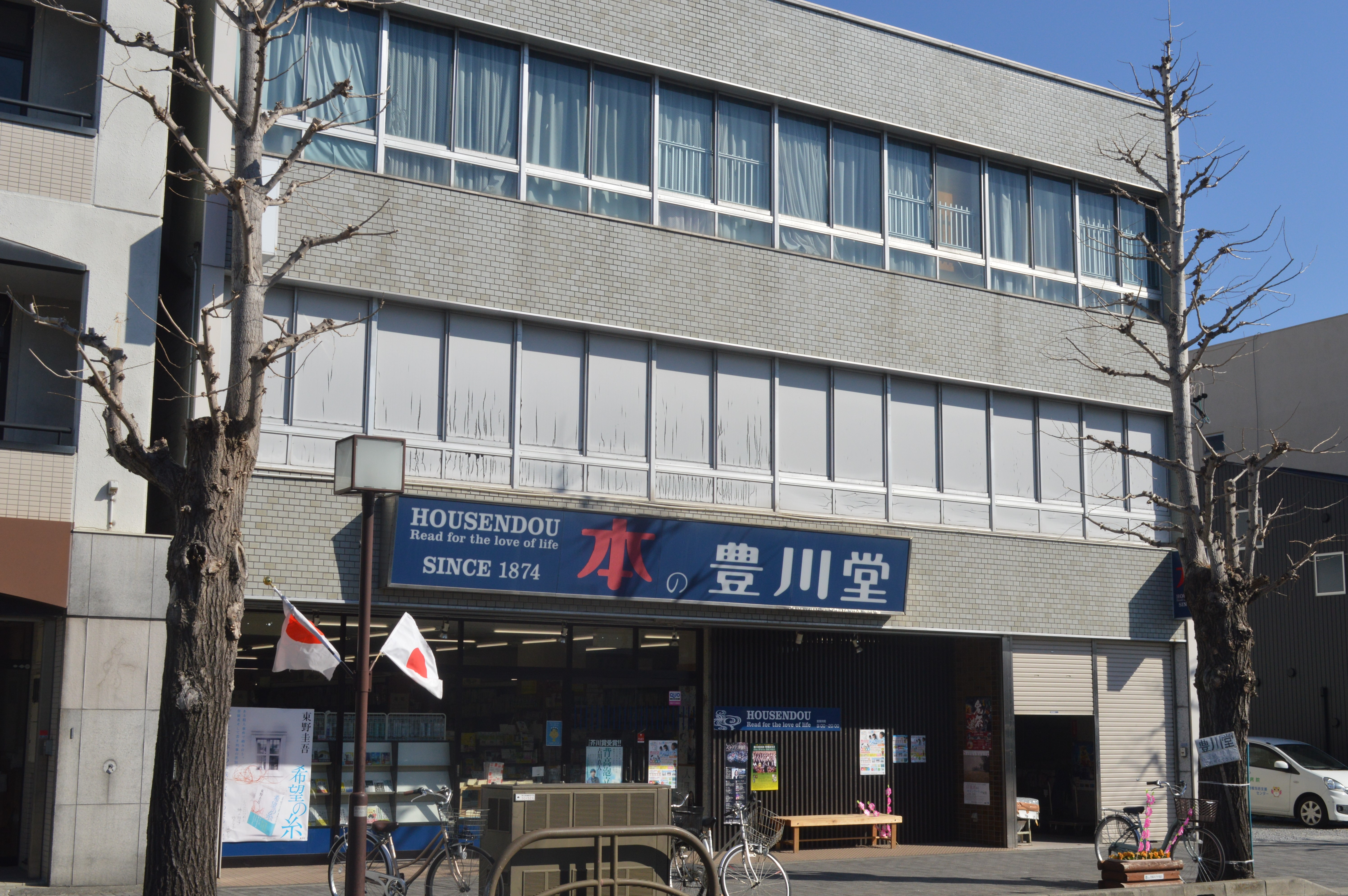 愛知県豊橋市呉服町にある書店「豊川堂」（ほうせんどう）本店。